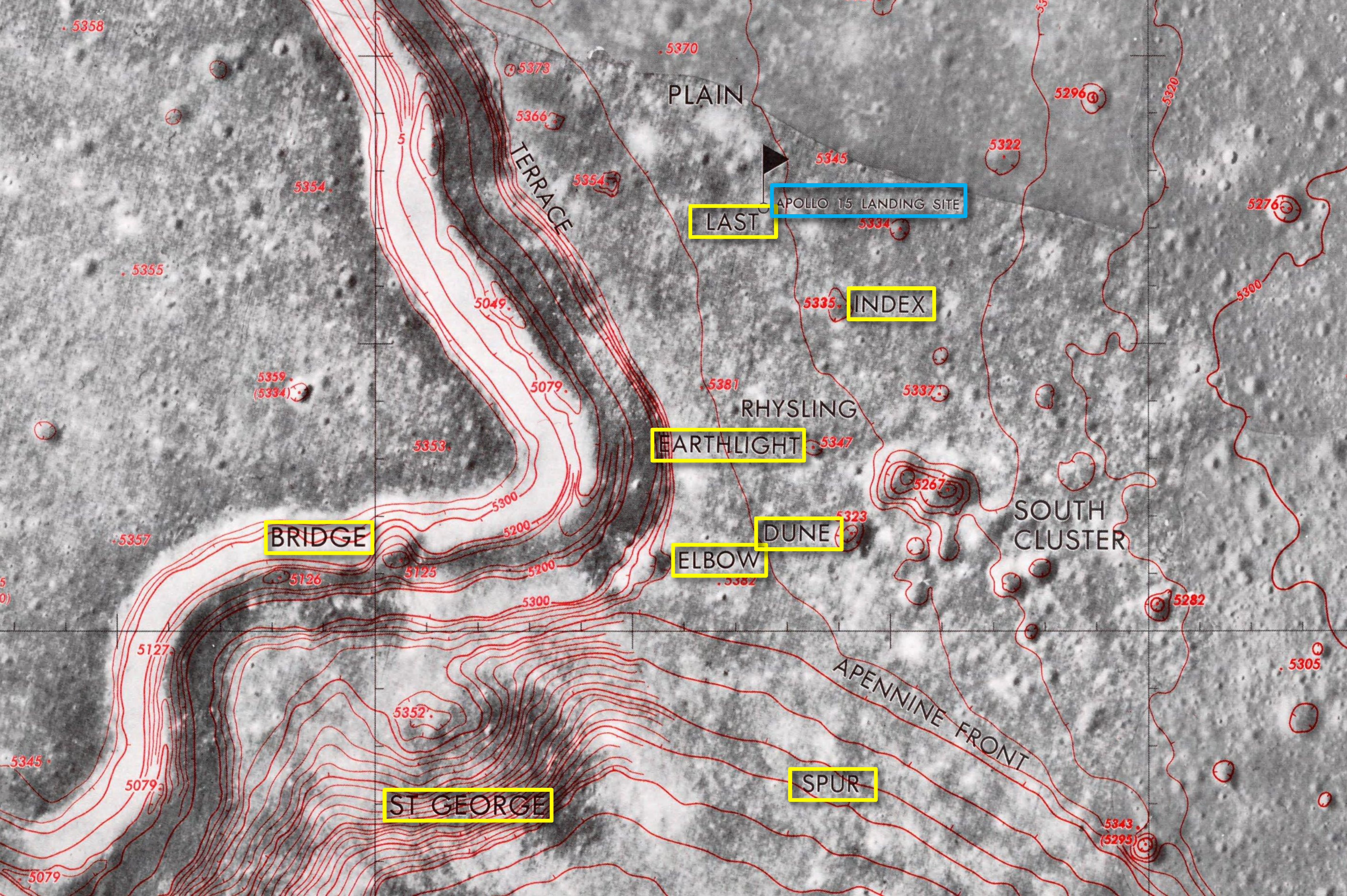 Cráteres cercanos al lugar de aterrizaje del Apolo 15. (Lunar Topophotomap. Hoja 41B4S1)